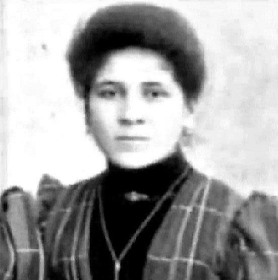 Կատարինե Զալյան-Մանուկյան (մահ.՝ 1965), հայ բժշկուհի, պետական գործիչ, Հայաստանի առաջին Հանրապետության պառլամենտի 2-րդ գումարման պատգամավոր: Հայաստանի առաջին Հանրապետության հիմնադիր Արամ Մանուկյանի կինն էր